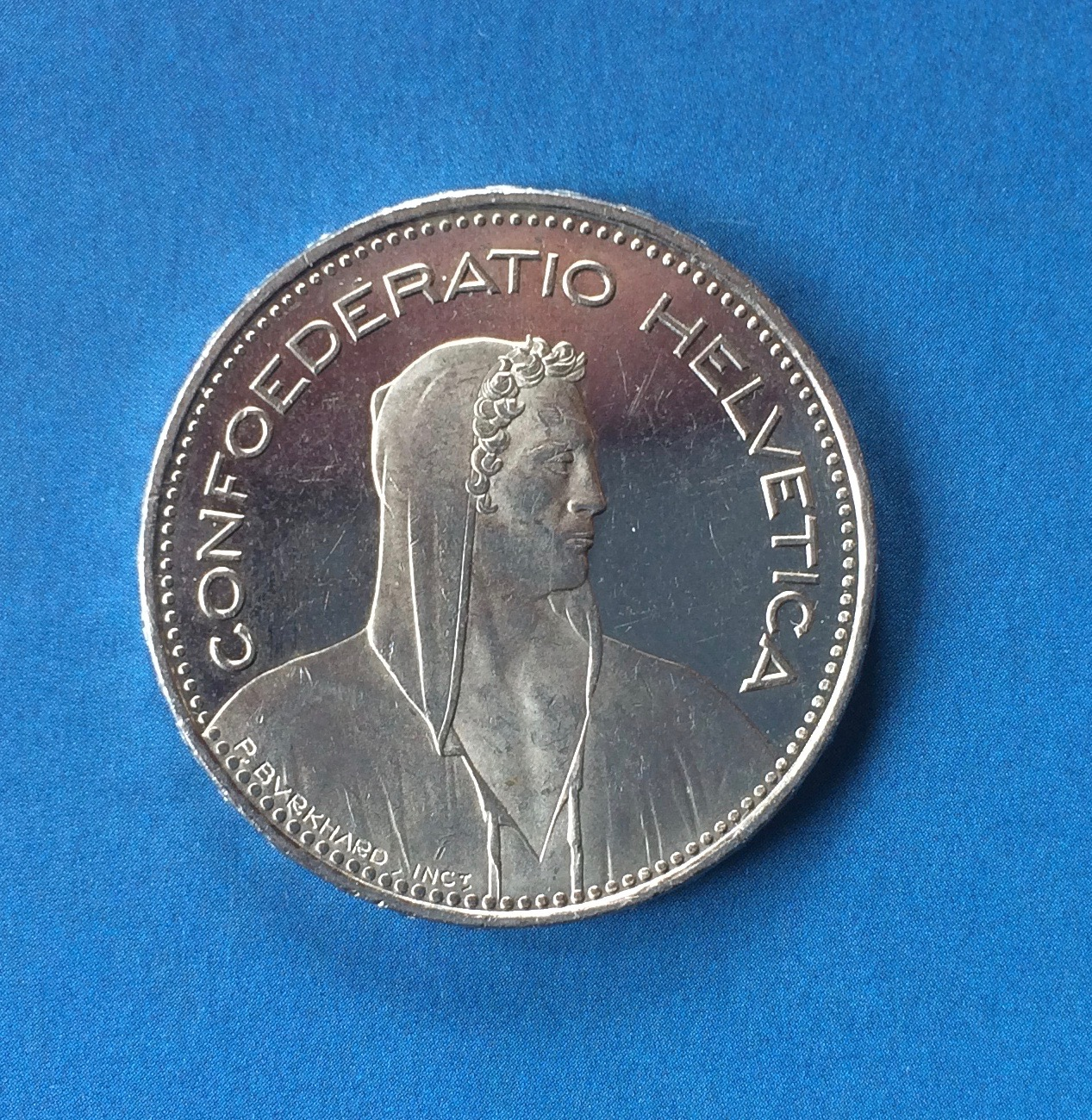 Fünffrankenstück